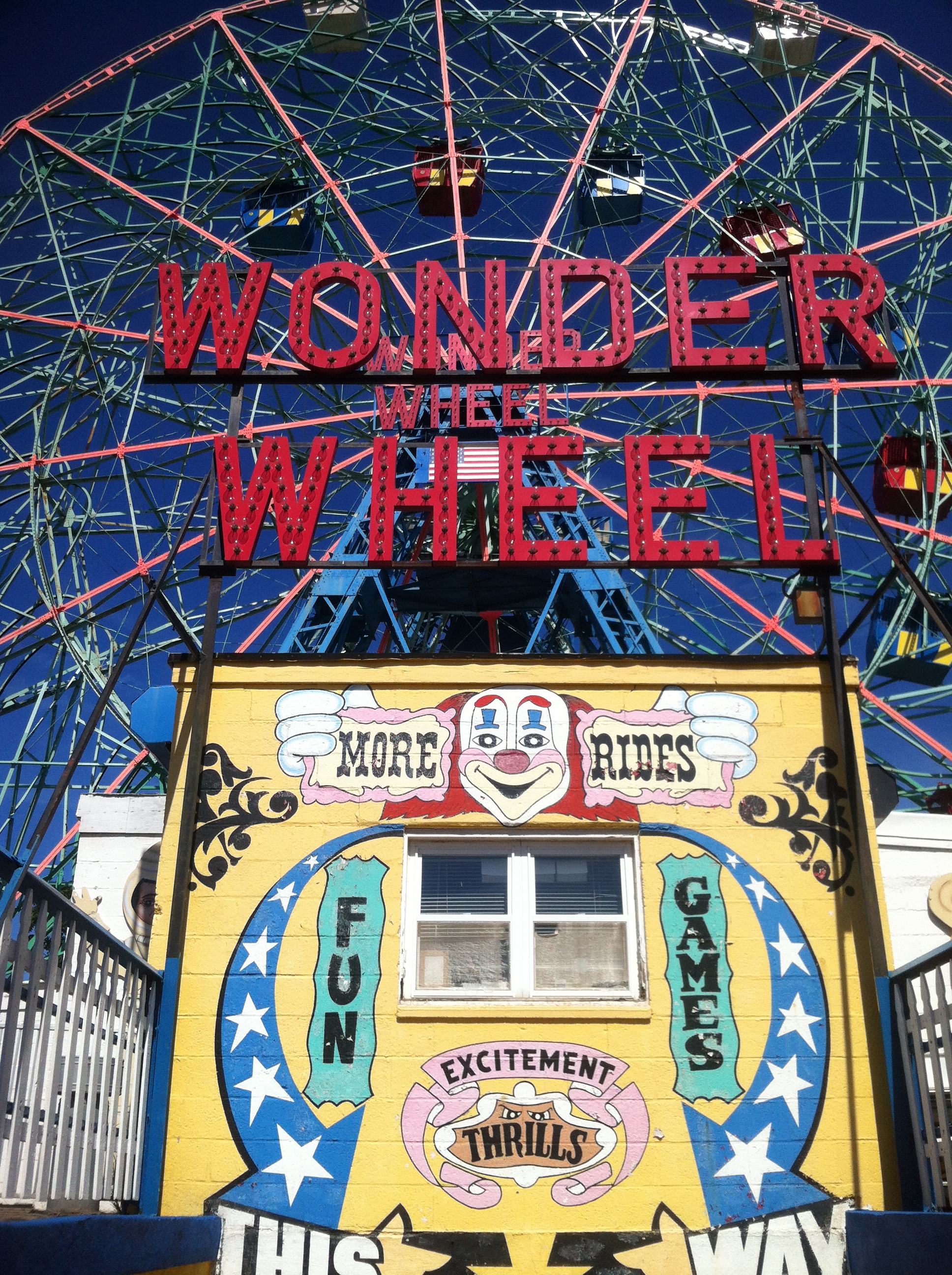 La Wonder Wheel se encuentra en el parque de atracciones 'vintage' de Coney Island en el Borough de Brooklyn